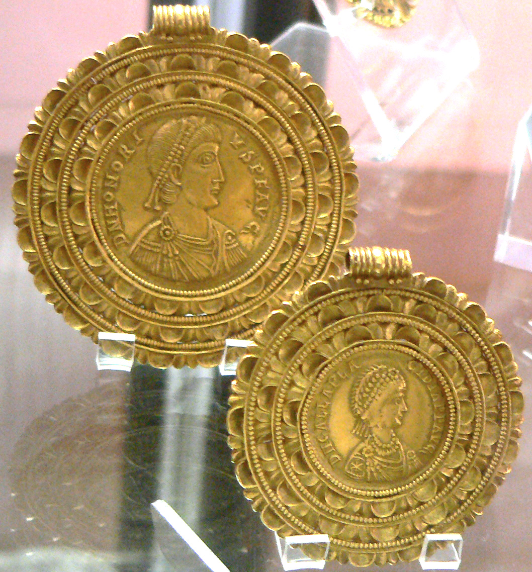 Médaillons d'Honorius et Galla Placidia. Trésor de Velp (Pays-Bas). Médaillon d'Honorius (384-423), frappé à Ravenne. Médaillon de Galla Placidia, frappé à Ravenne en 425. Ces deux médaillons d'or aux riches montures, étaient montées en collier. Ils faisaient partie d'un trésor monétaire enfoui peu après 425 et découvert fortuitement en 1715. Acquis en 1822.